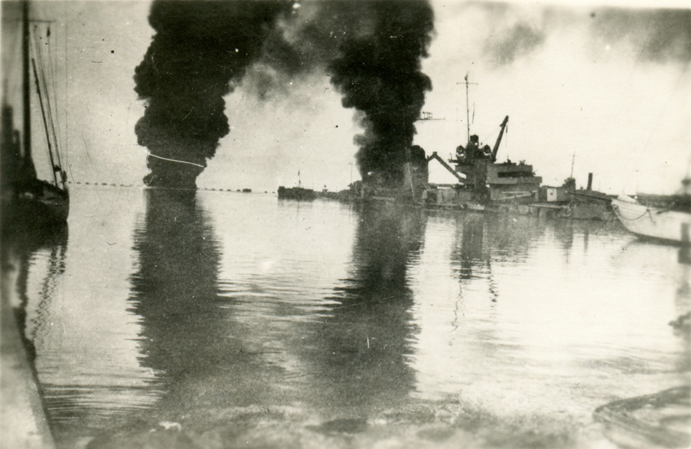 Vue du sabordement de la Flotte à Toulon le 28 novembre 1942.